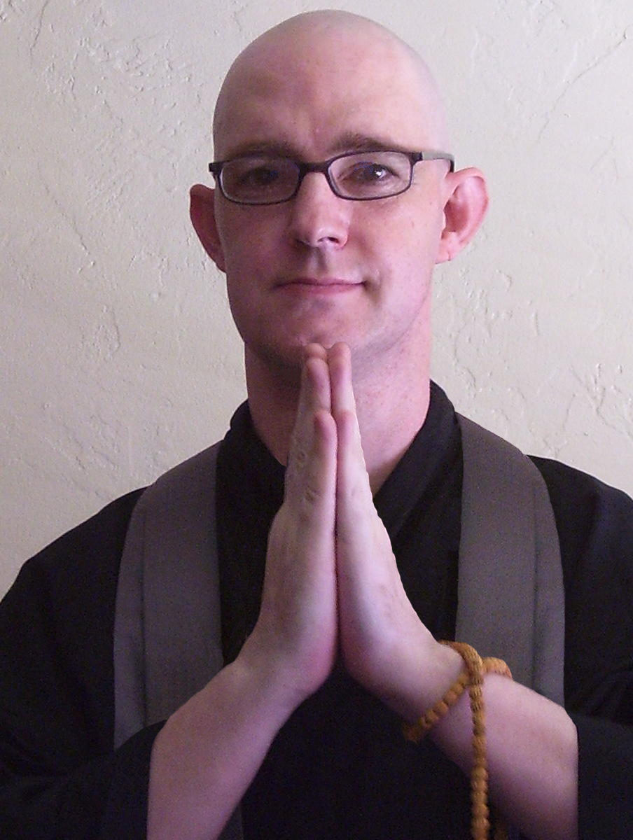 Barry Graham